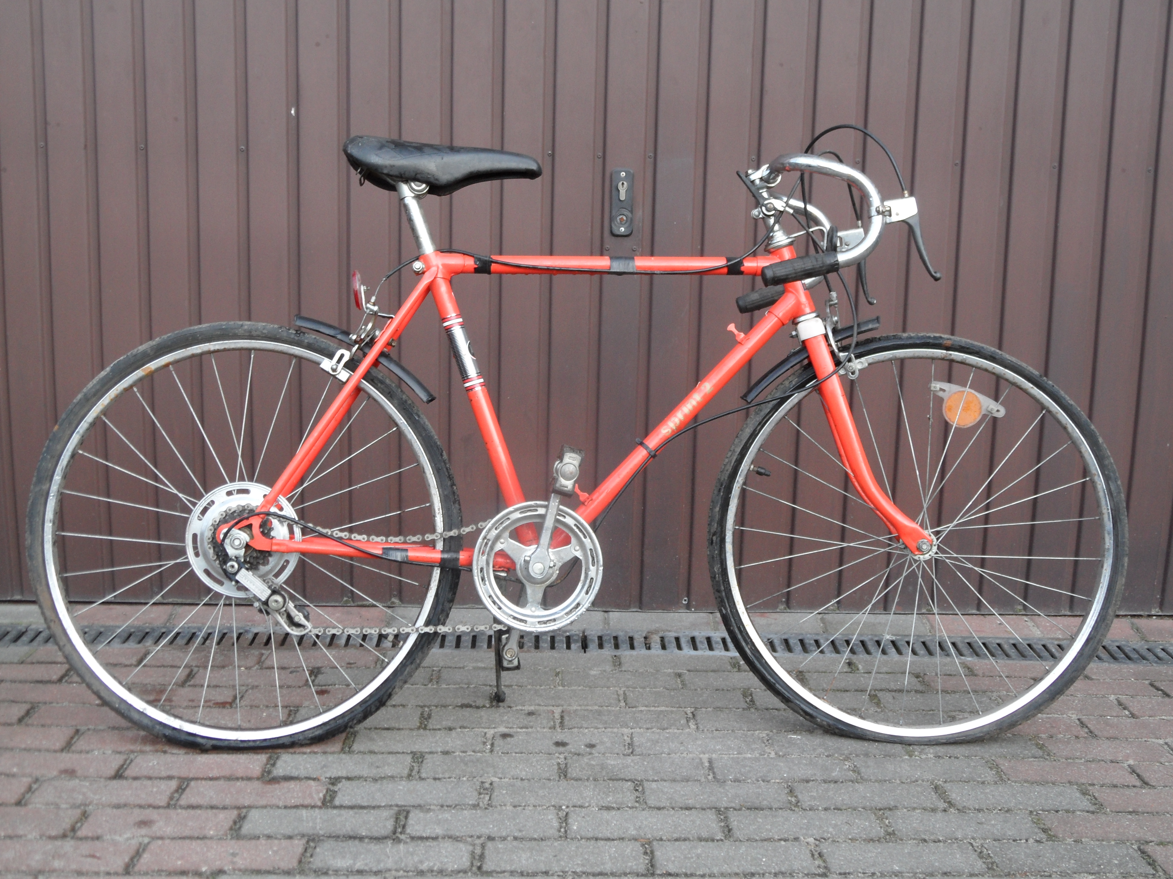 Rower Sprint 2 wyprodukowany w latach 80. w zakładach Romet